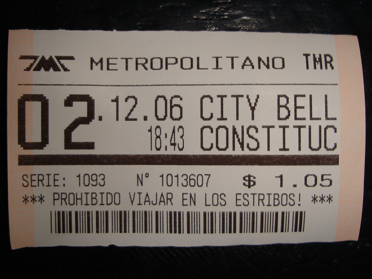 Perteneciente a la línea General Roca.